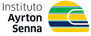 Originální logo institutu